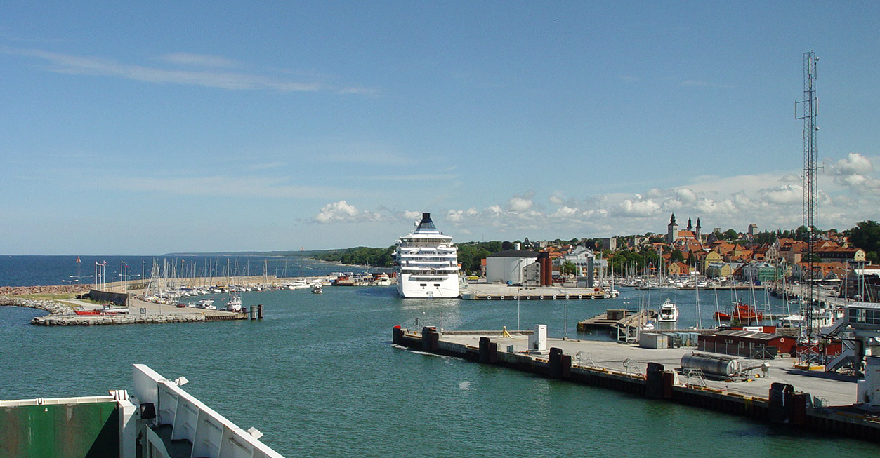 Gotland: Visby-Hafen mit Altstadt